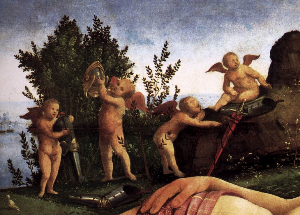 detail